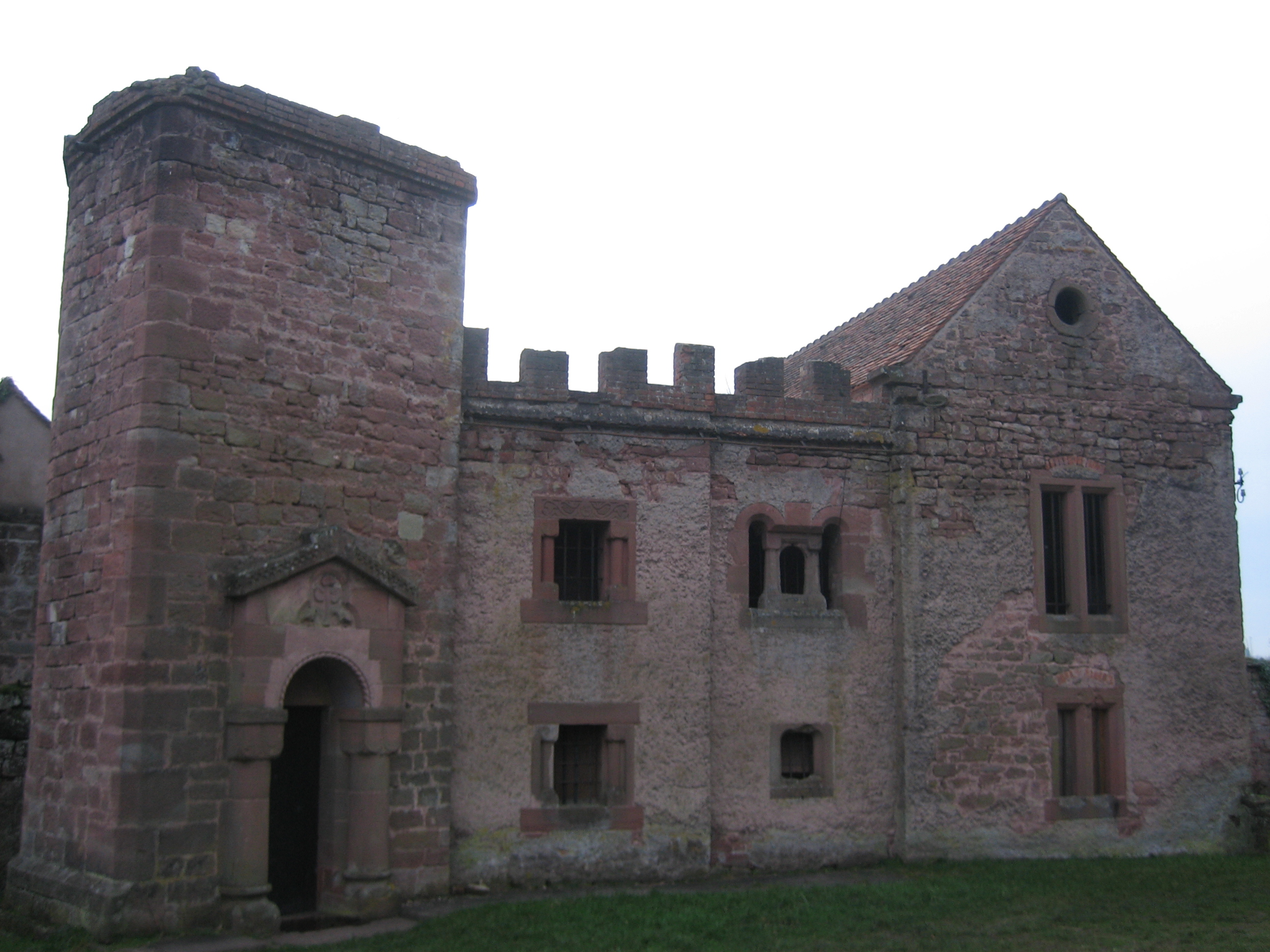 Chapelle du Château de Lutzelbourg (France)